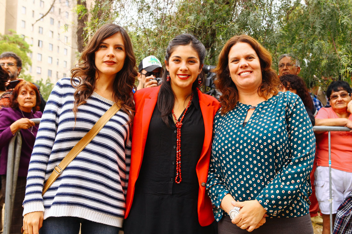 Camila Vallejo, Karol Cariola y Maya Fernández.